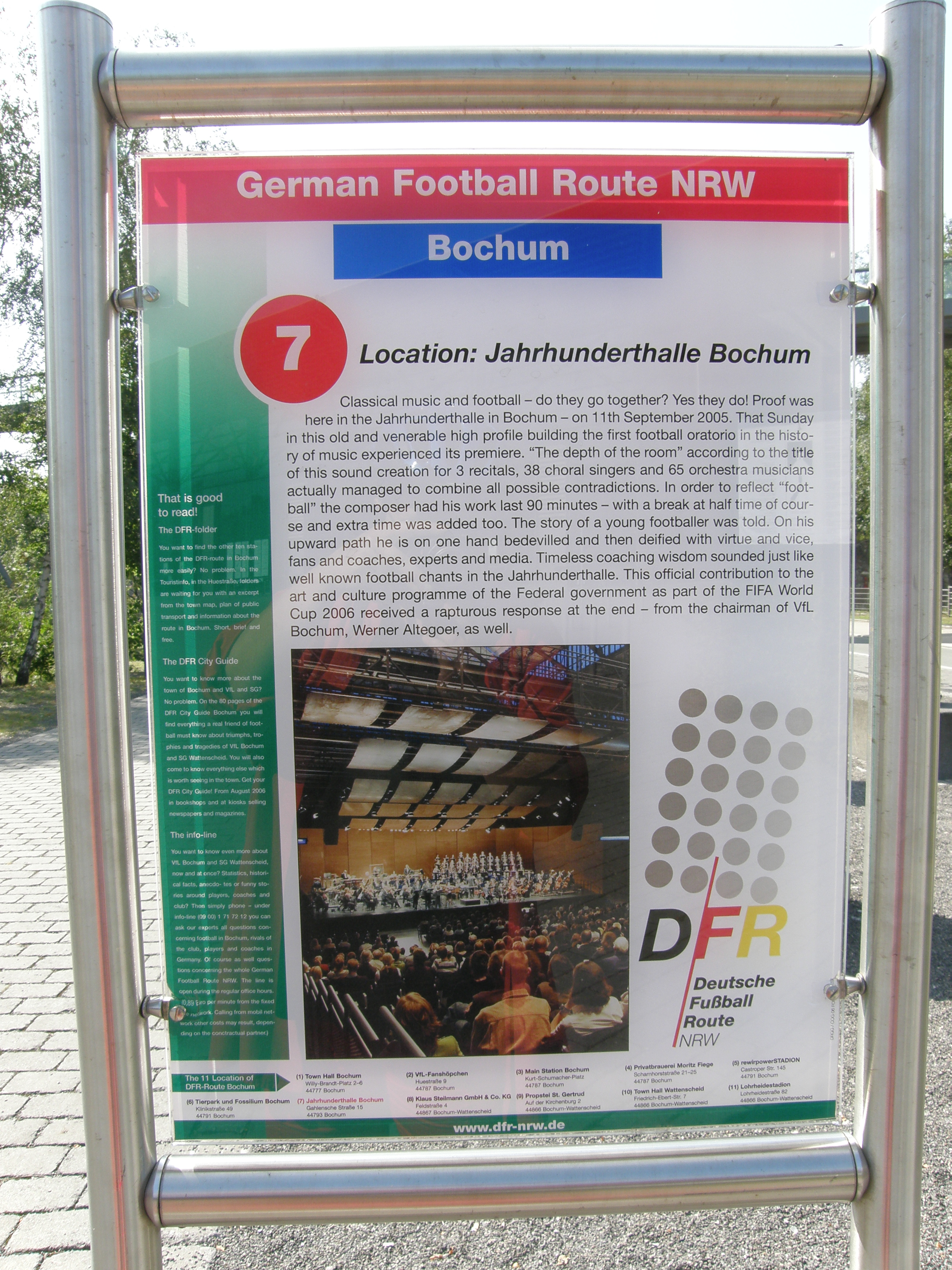 Infoschild an der Jahrhunderthalle in Bochum zur Deutschen Fußballroute (Station 9)